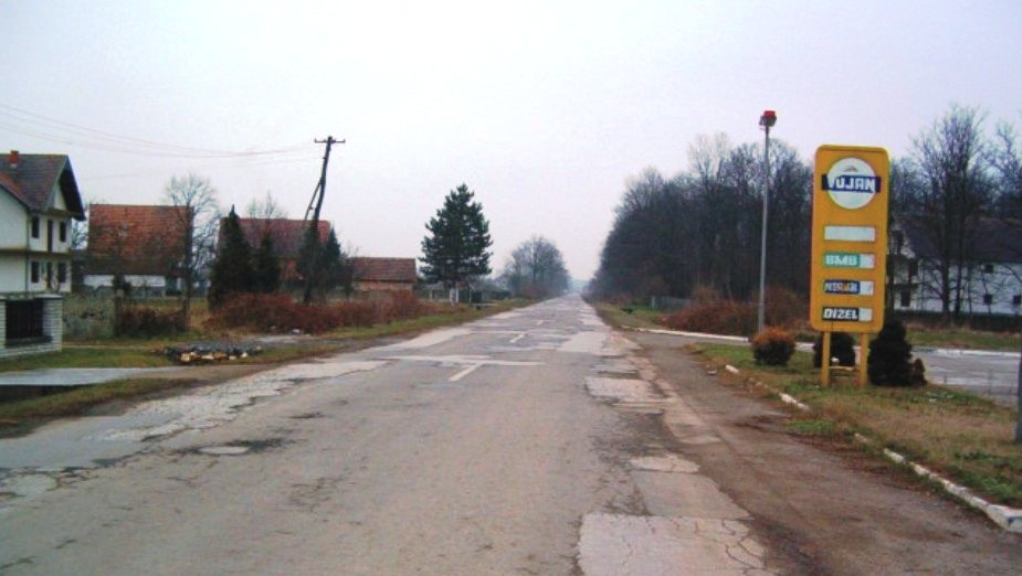 Таково